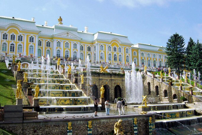 Grote Cascade Peterhof. Eigen foto, augustus 2002.